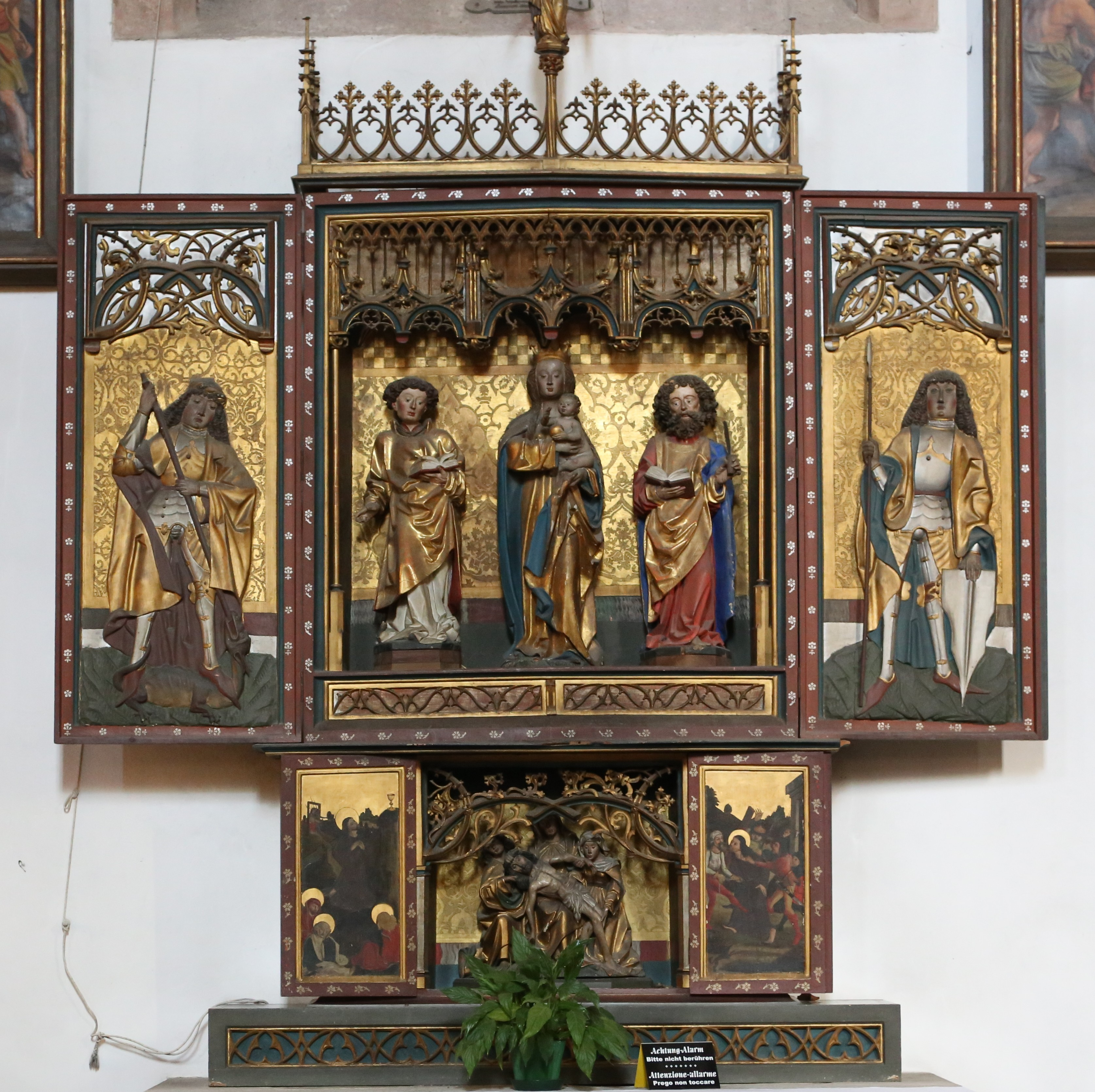 Pfarrkirche St. Nikolaus, Meran